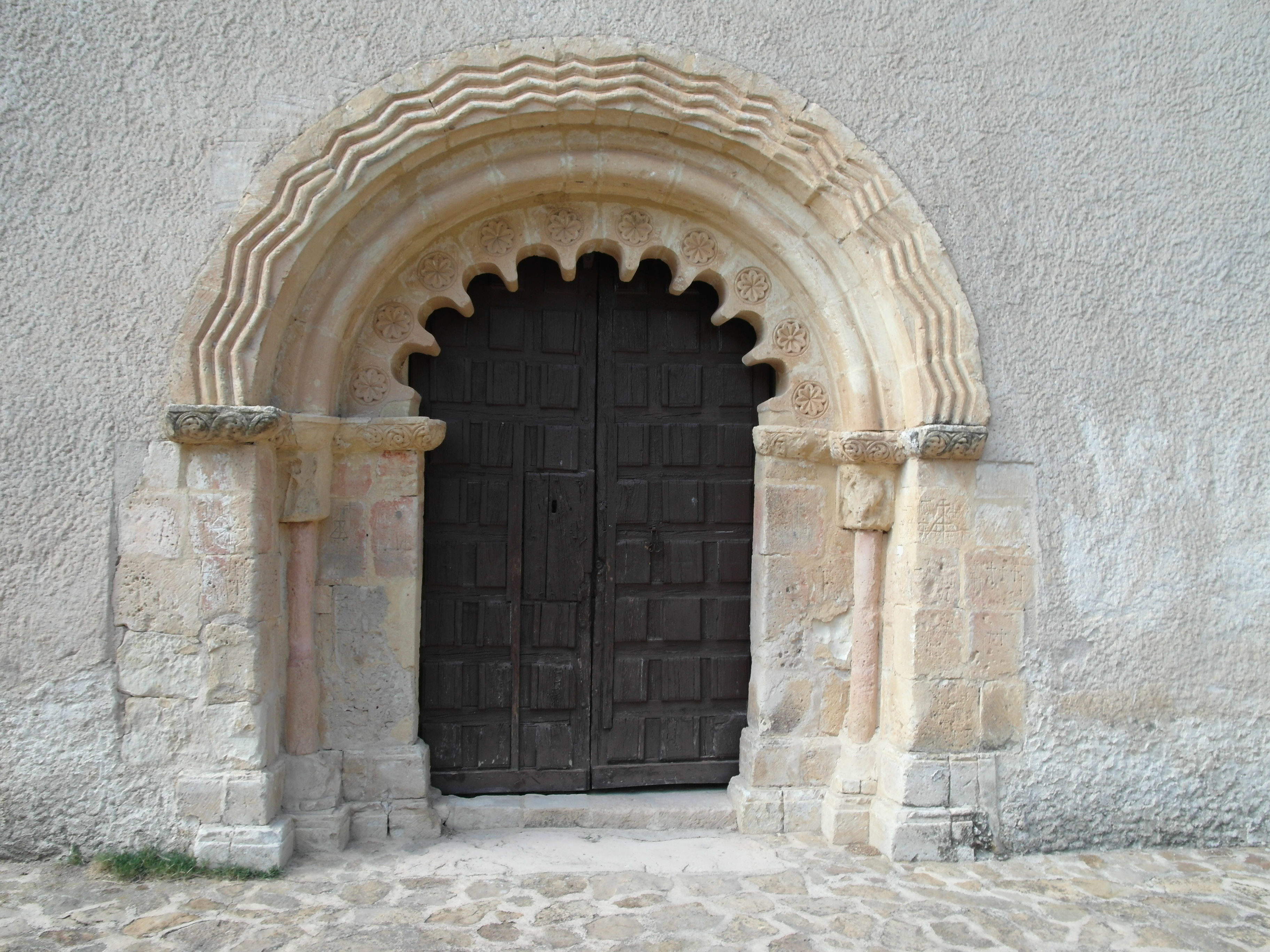 Iglesia de la Natividad de la Virgen, Sotillo, Segovia.